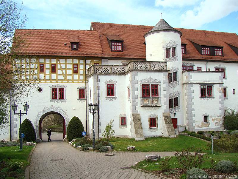 Torhaus von Schloss Liebenstein bei Neckarwestheim